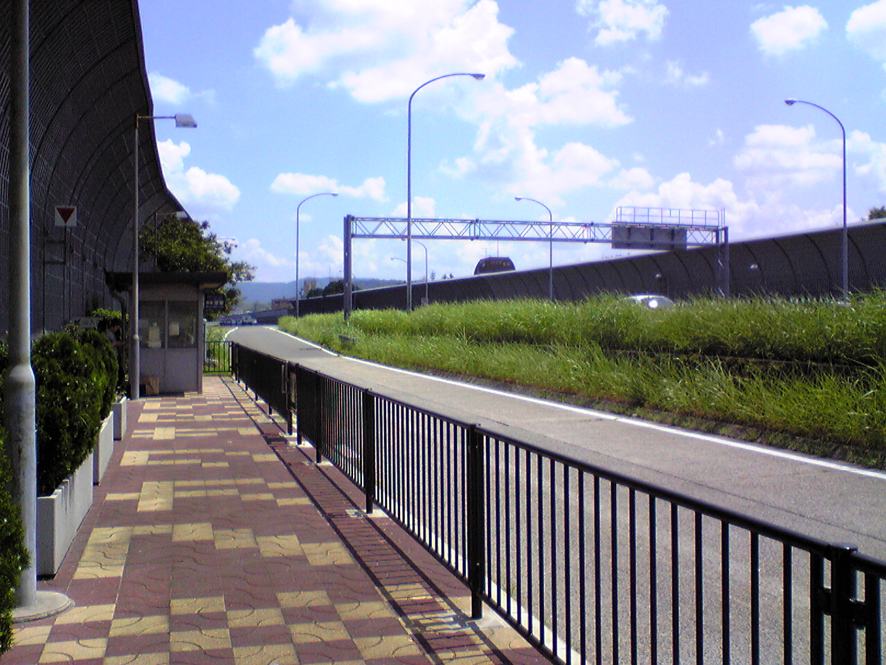 名神深草の東京方面バス停